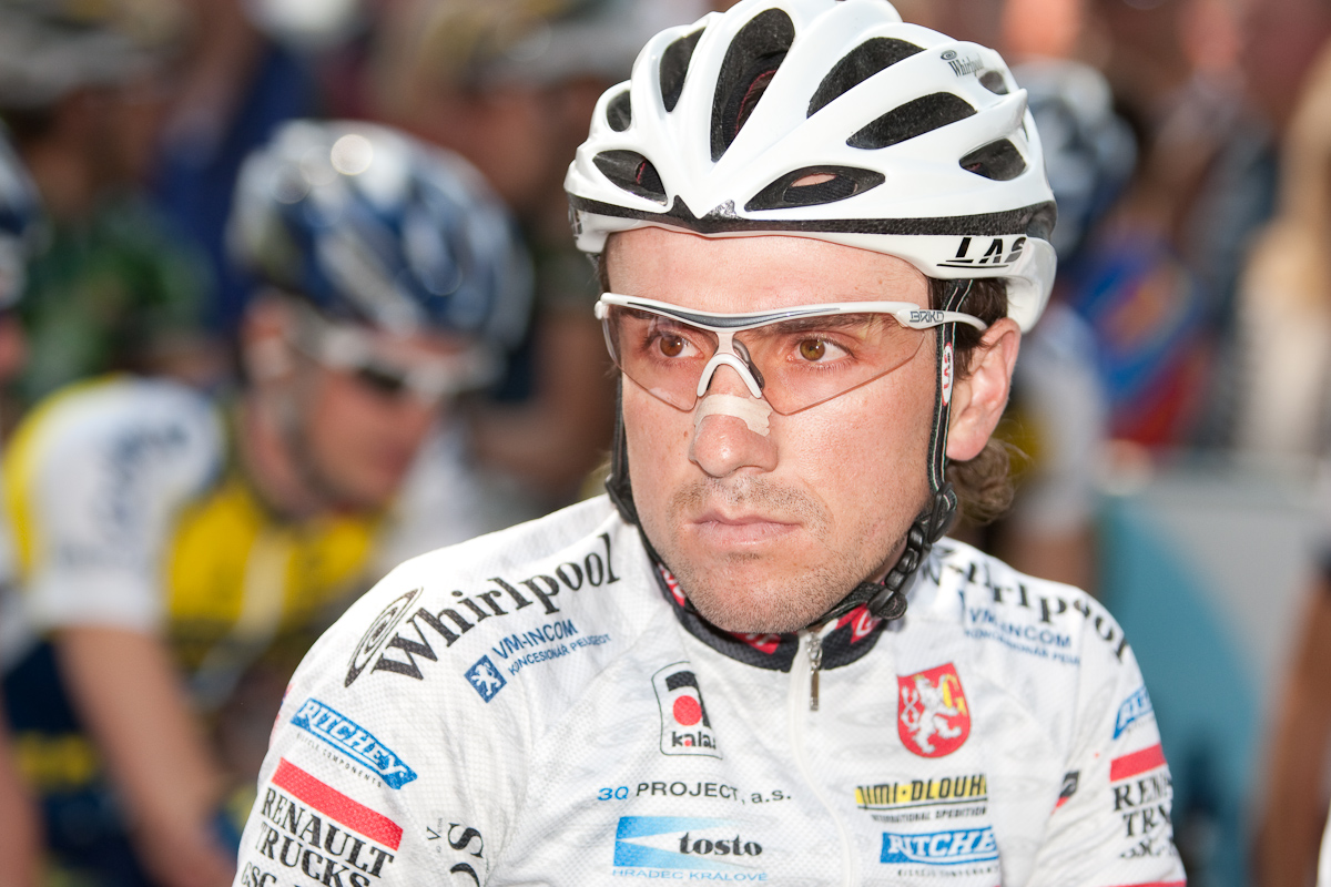 Martin Hebik, Eschborn-Frankfurt City Loop 2009